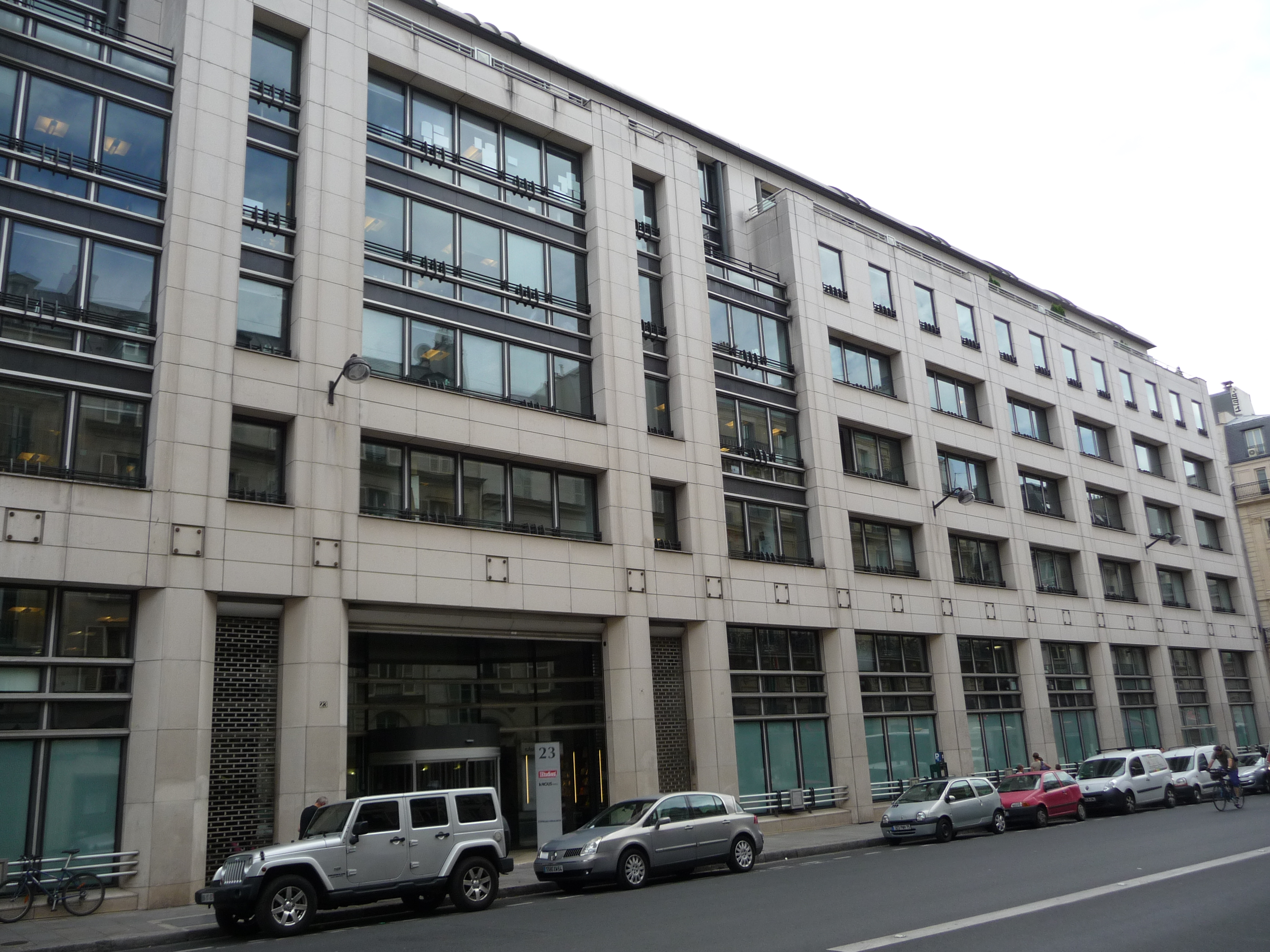 Locaux de l'Express, au 29 rue Chateaudun à Paris.